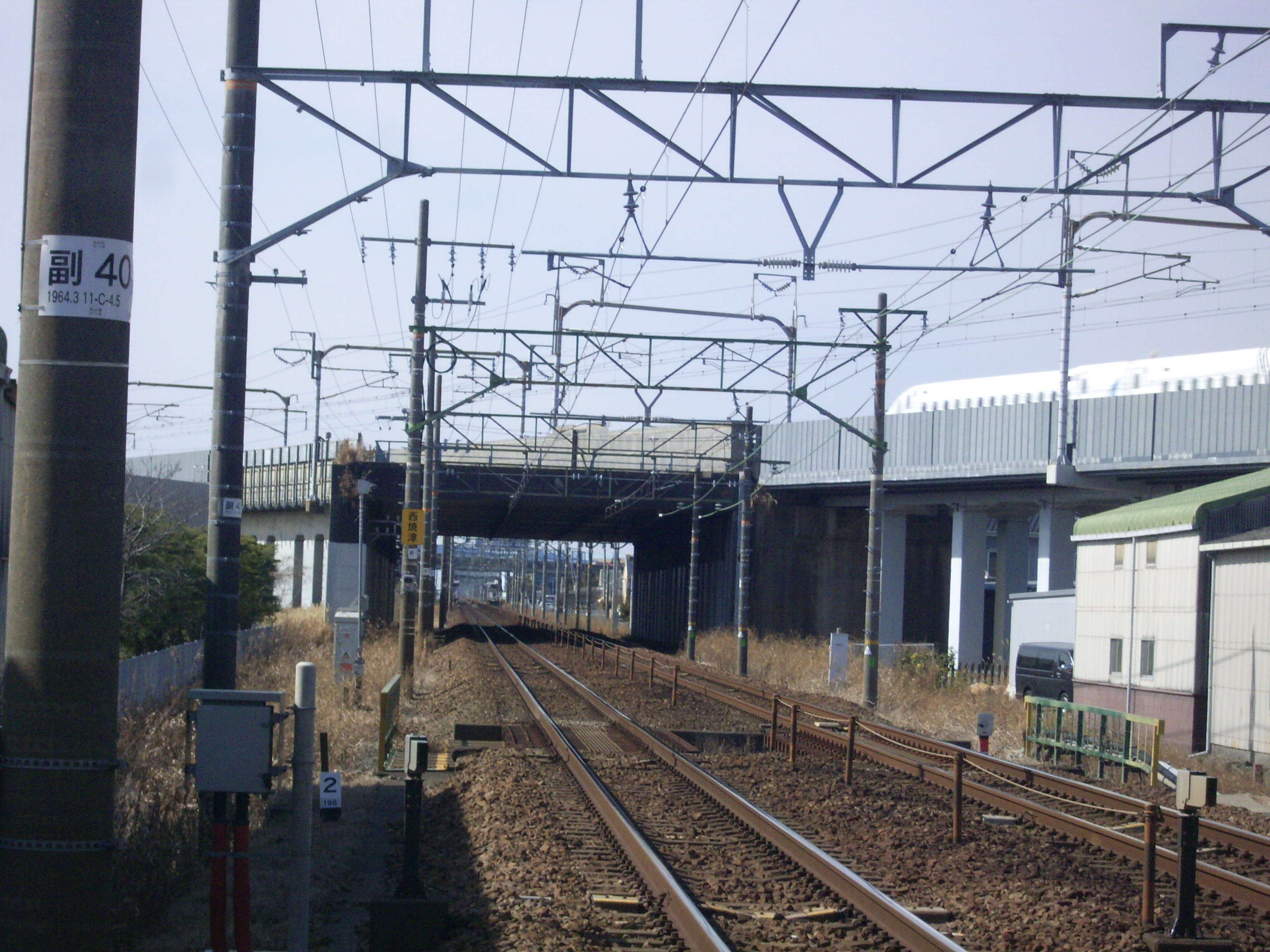 東海道本線と並走しつつ東海道新幹線が追い越してゆく、いわゆる乗っ越し橋構造の五ヶ堀線路跨線橋（西焼津駅近郊） ㊟カメラを起動すると日付機能が出荷時のものに初期化されるため、ファイル履歴の投稿日時とメタデータの原画像データの生成日時が異なります（本概要欄の下記日付が撮影日）